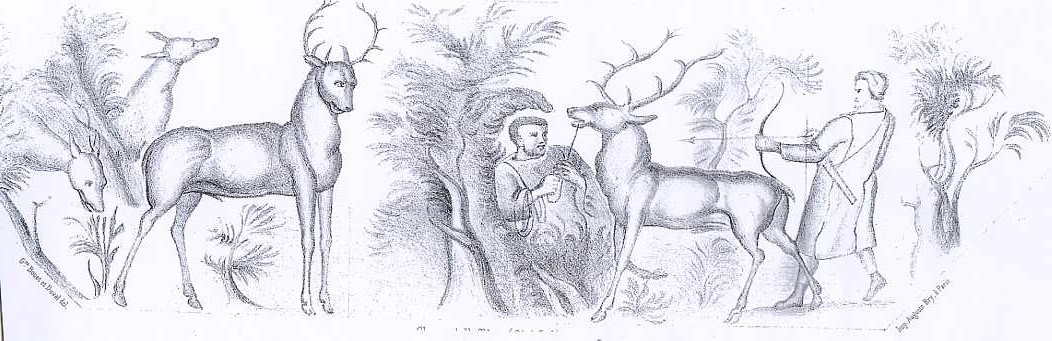 détail mosaique de lillebonne